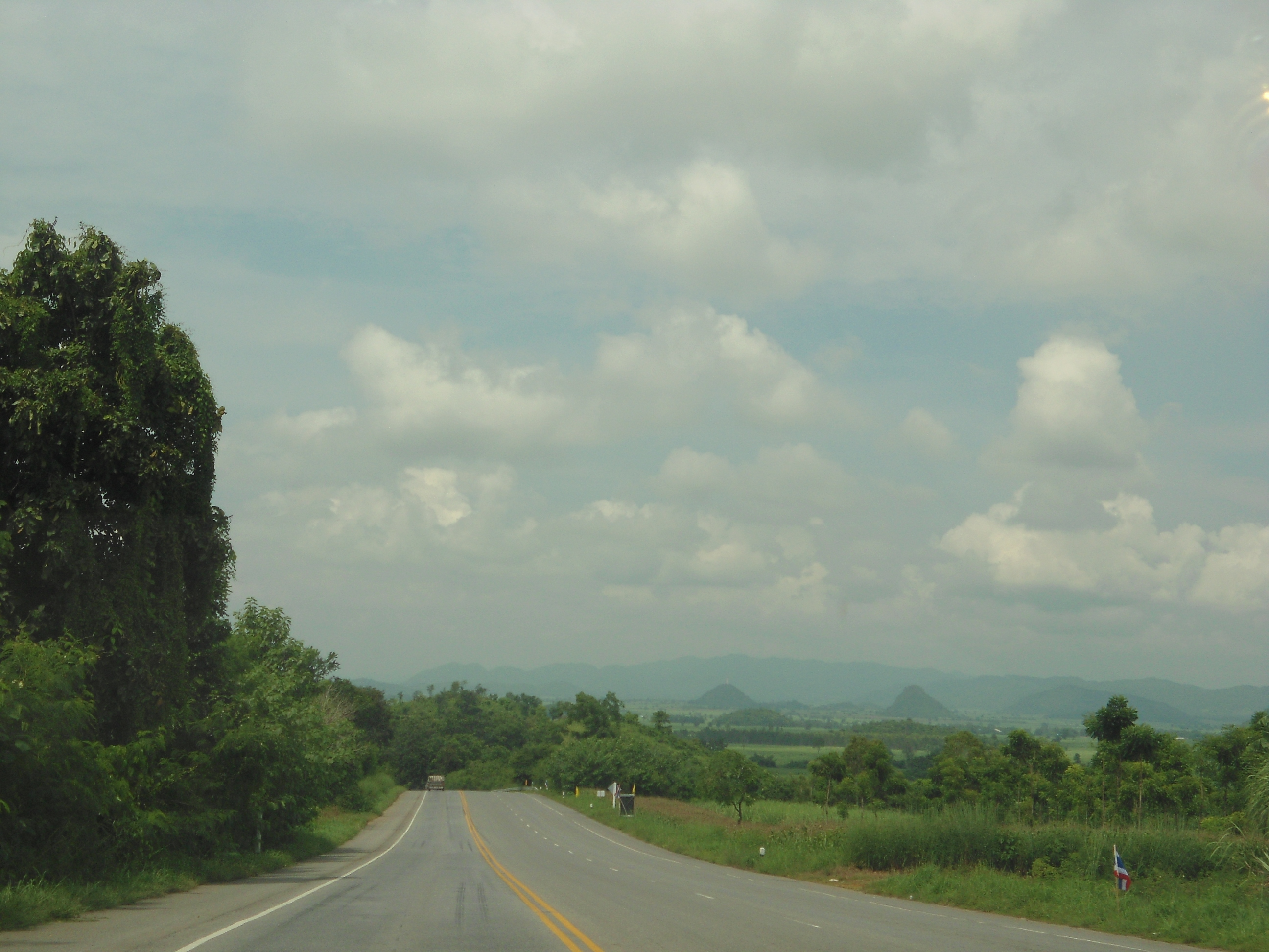 ทางหลวงแผ่นดินหมายเลข333 ช่วงตอน อำเภอด่านช้าง-อำเภอบ้านไร่